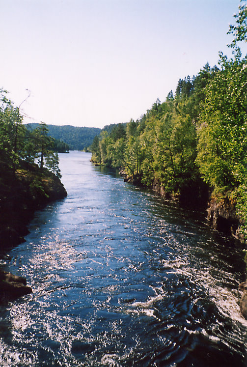 Otra